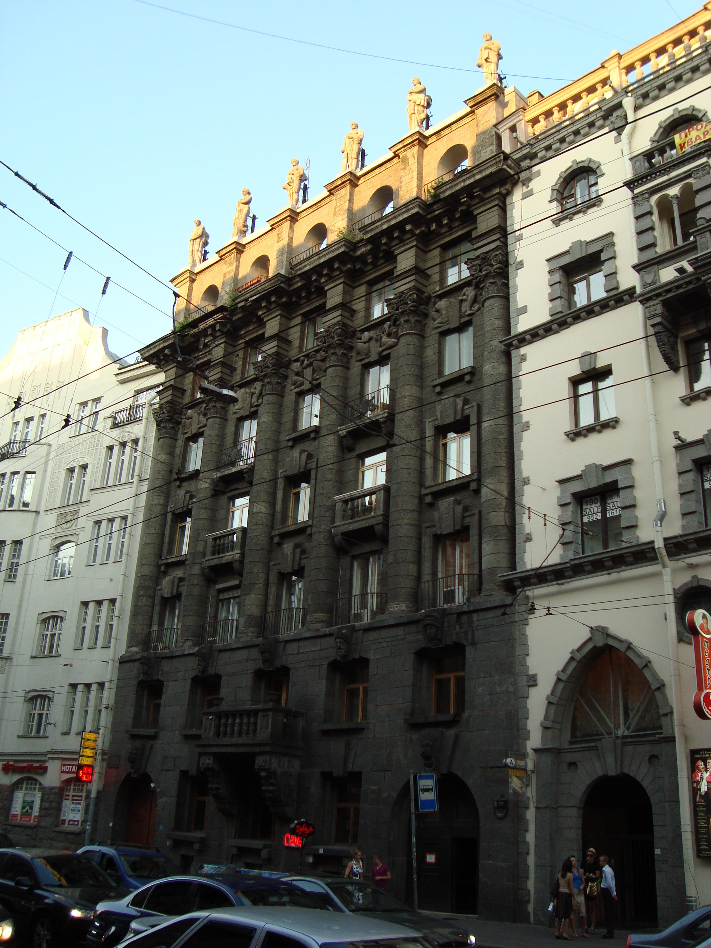 Большой пр. ПС, 77